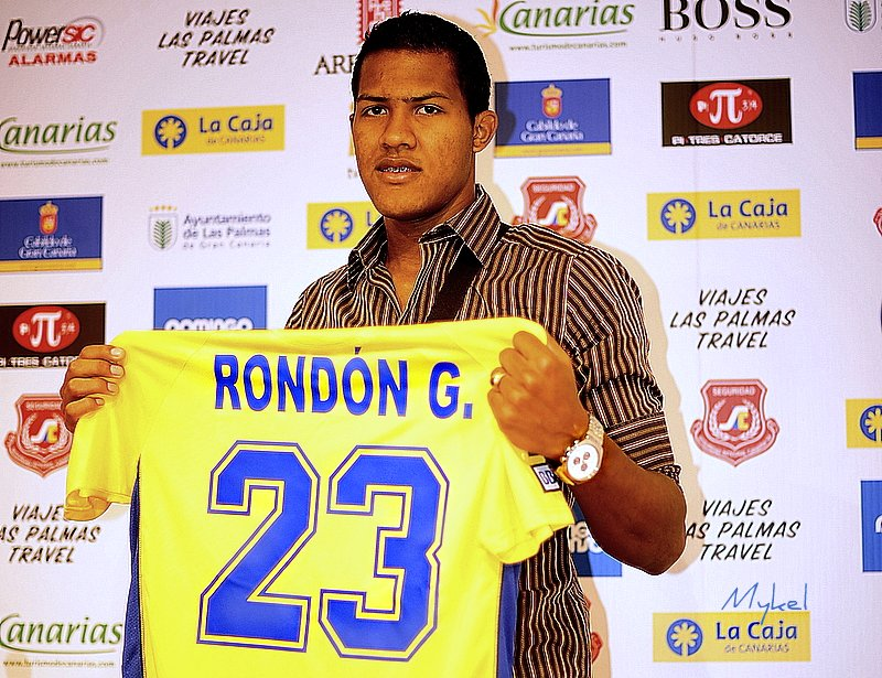 Salomon Rondon, nuevo fichaje UD Las Palmas